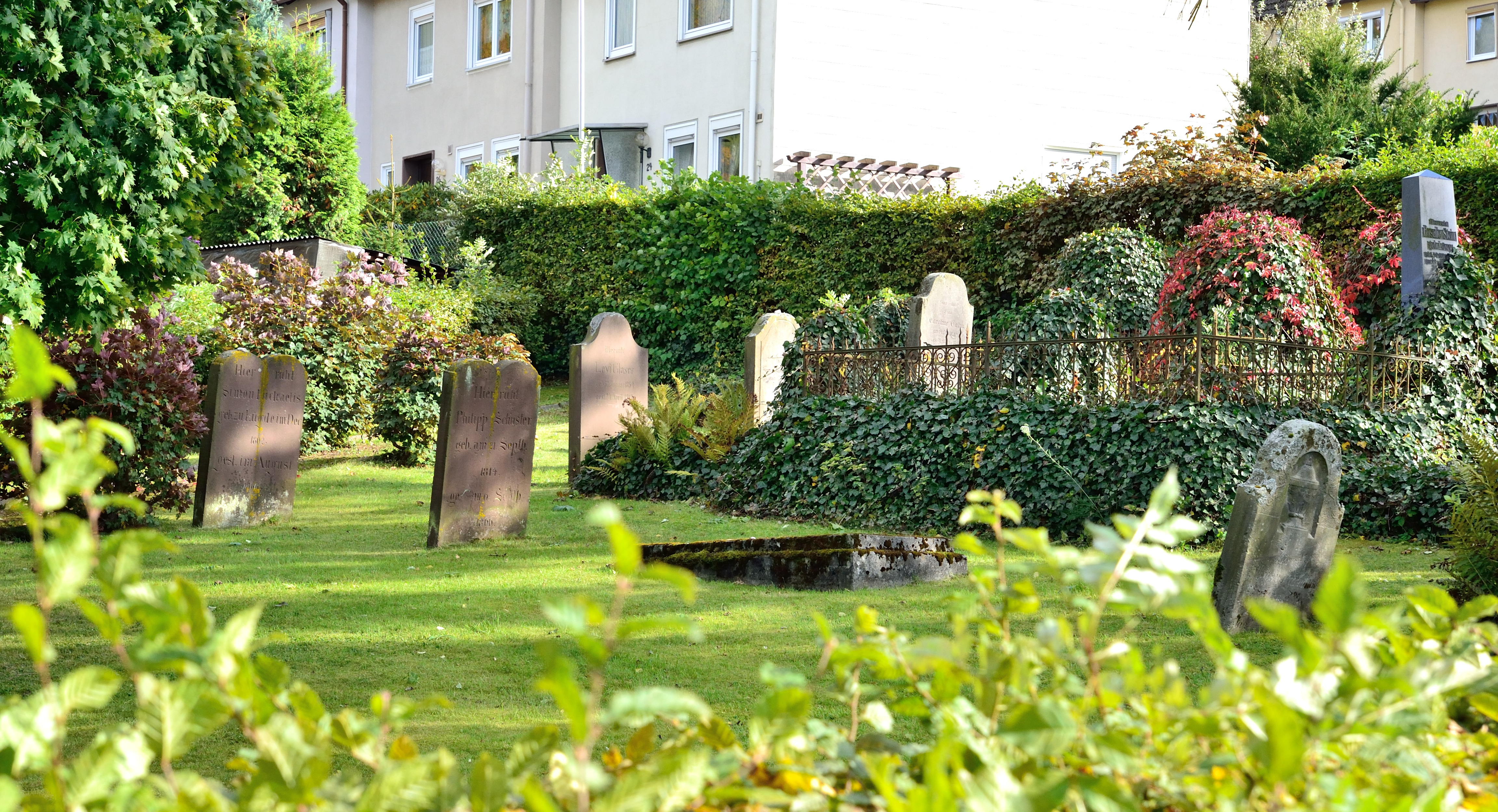 This is a photograph of an architectural monument. Jüdischer Friedhof